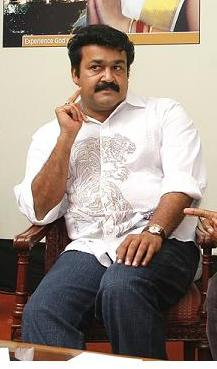 Malayalam actor Mohanlal at a unveiling ceremony.